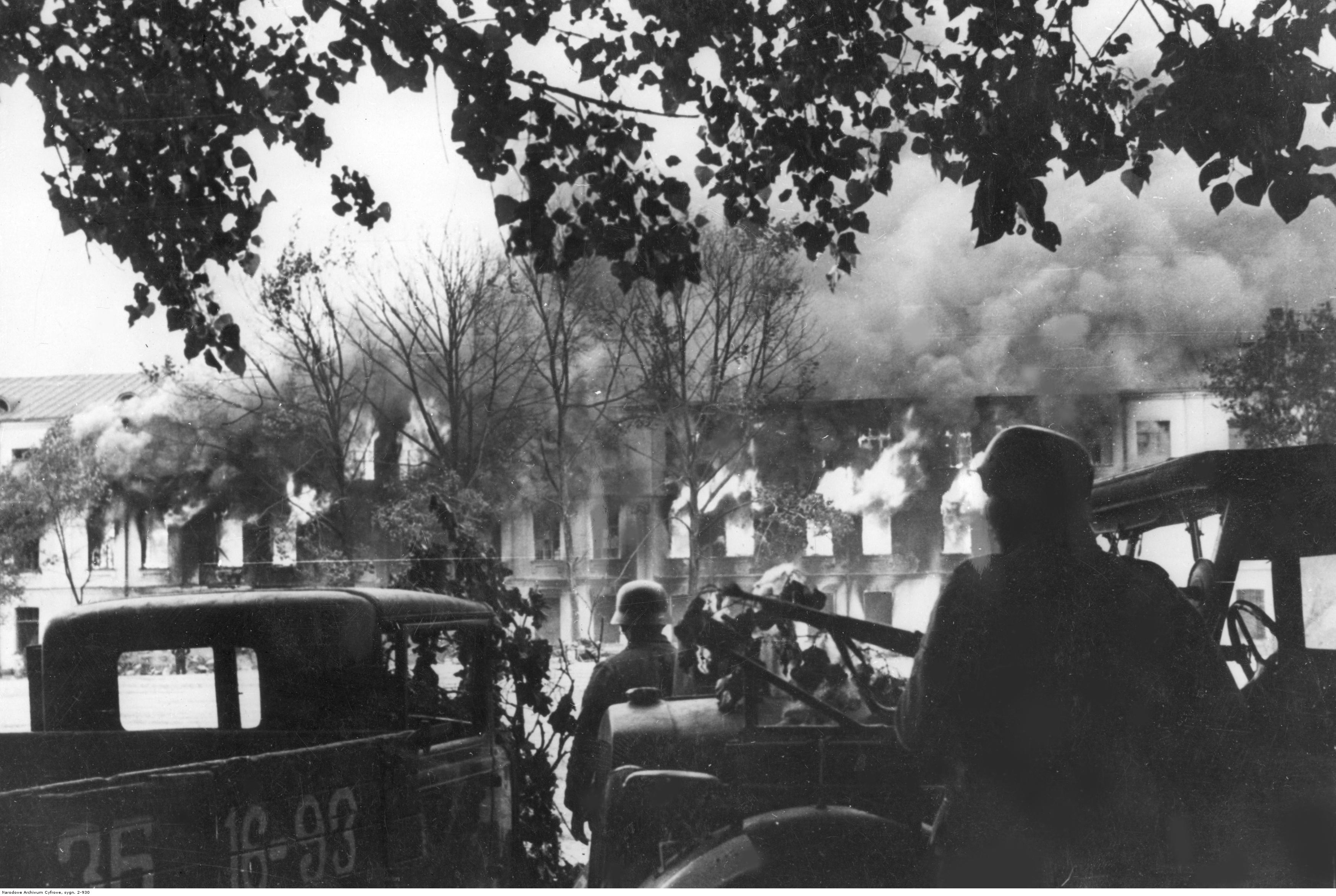 Wkroczenie wojsk niemieckich do Smoleńska. Żołnierze przed płonącym domem.